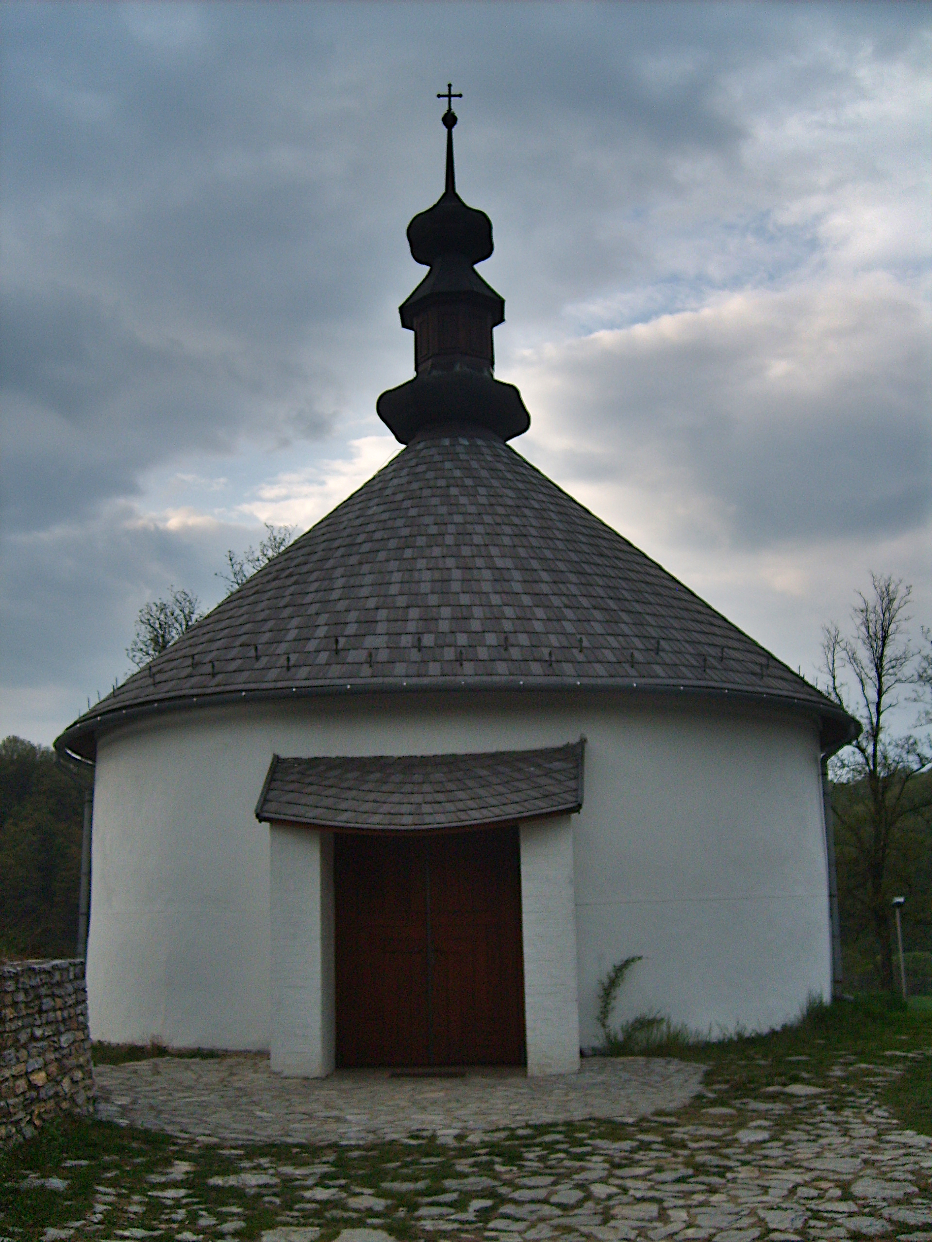 Kissikátori kerektemplom